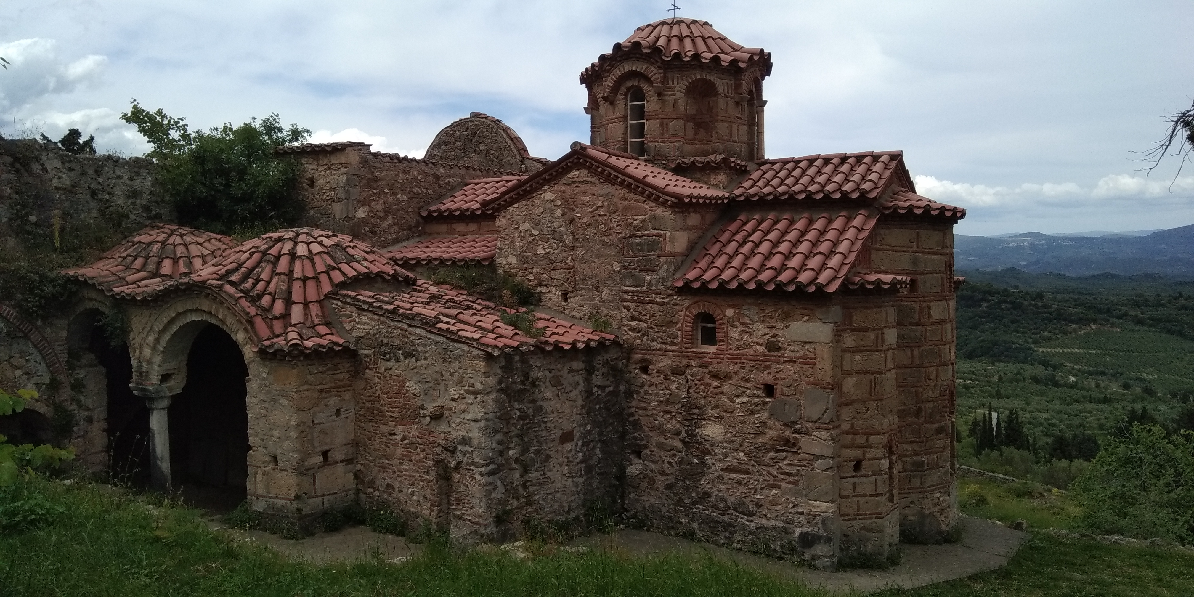 Evangelistria à Mistra, vue coté ouest.